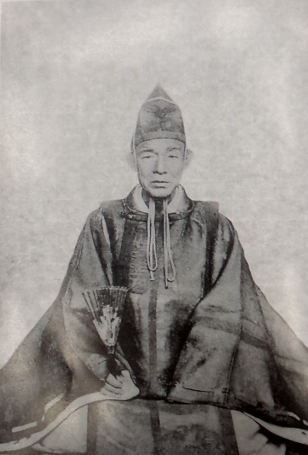 平山省斎(敬忠)の肖像写真。